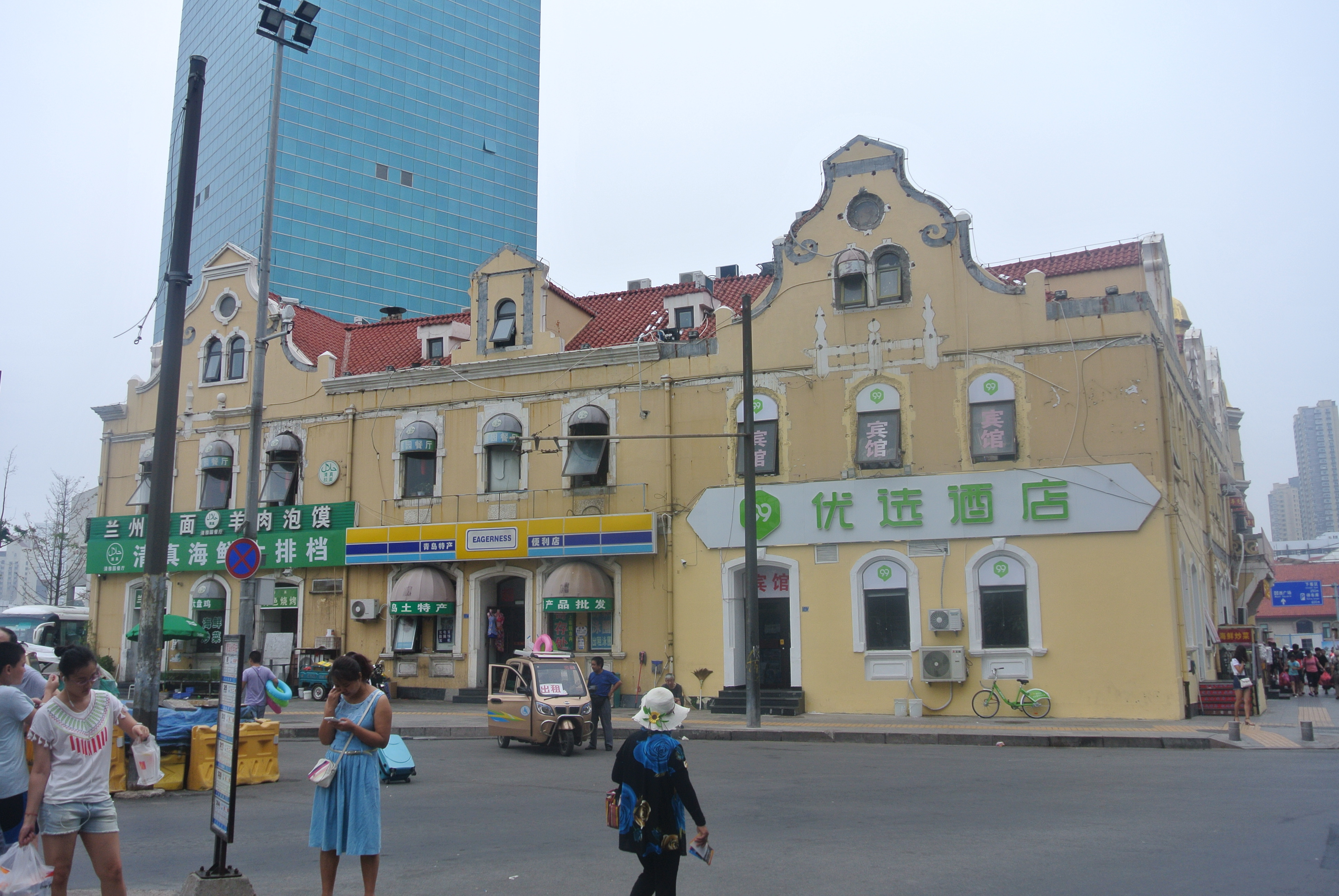 青岛车站饭店旧址立面状况